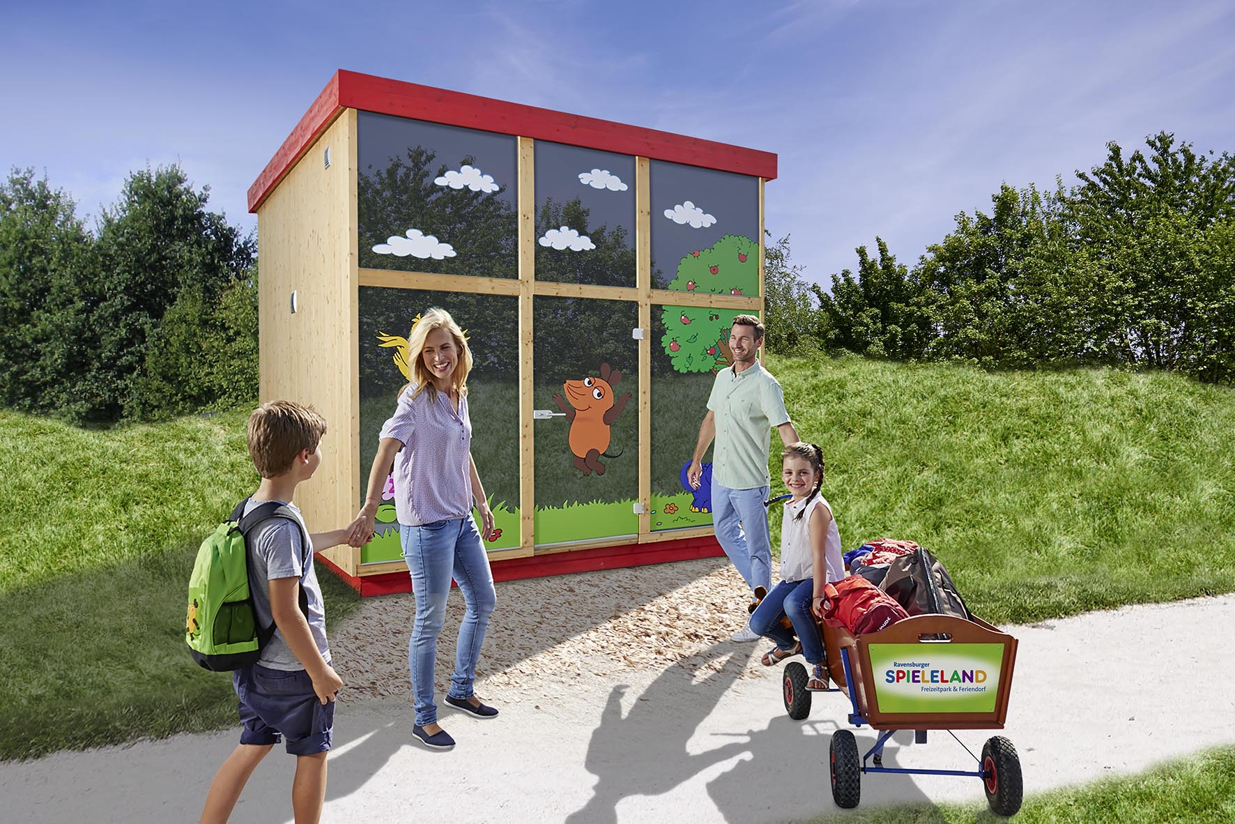 Feriendorf Ferienhaus